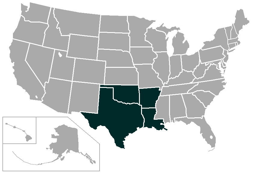 Derived from here